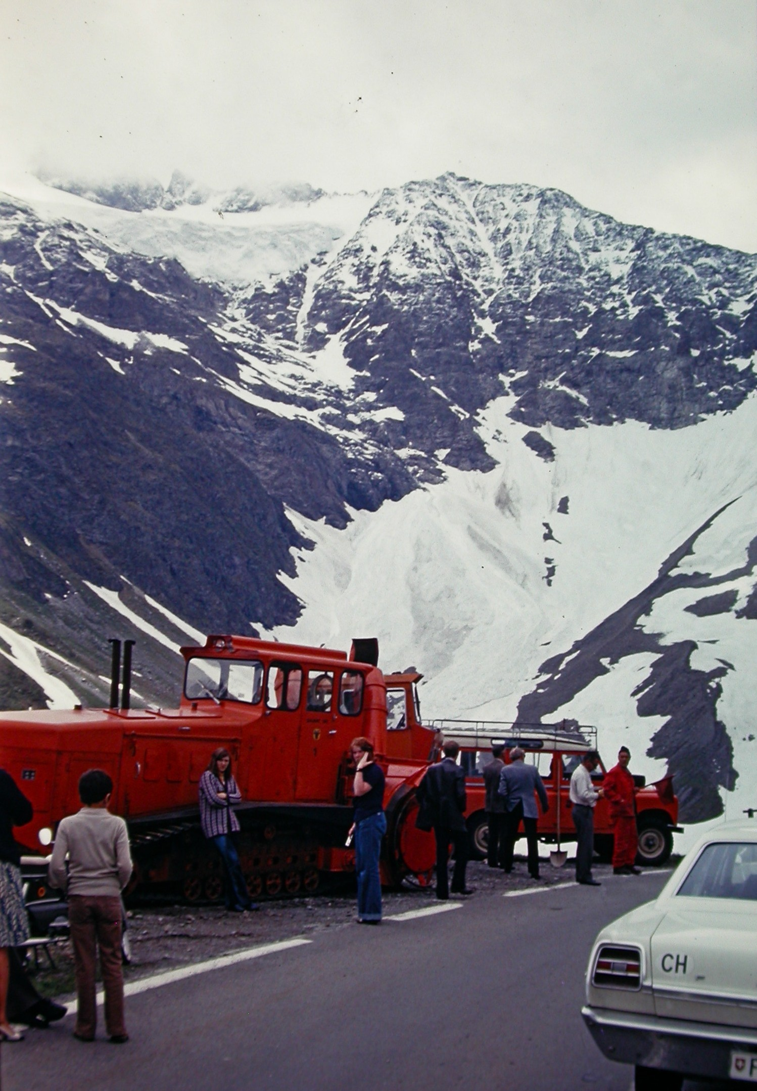 Zum Sustenpass im Meiental